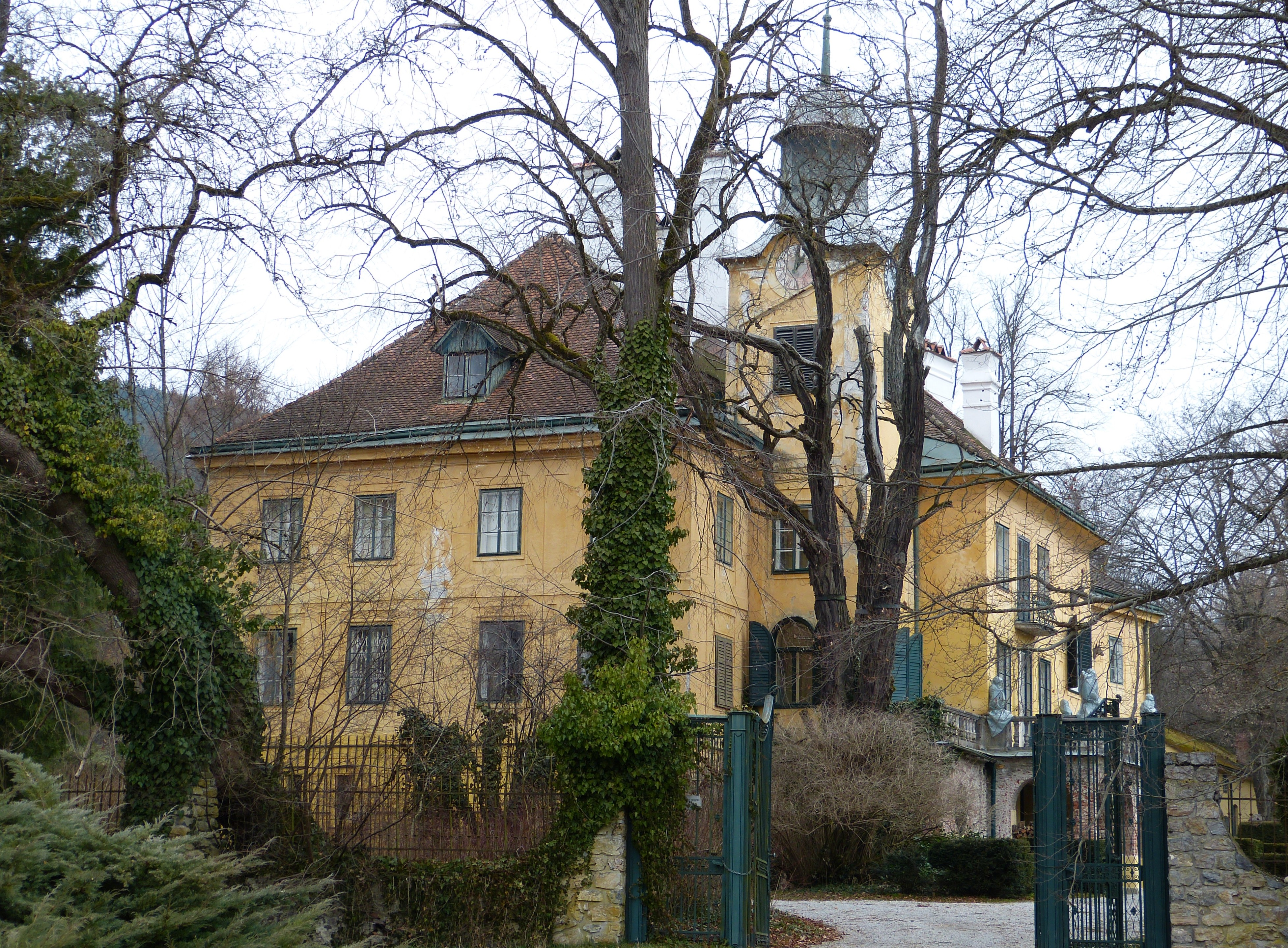 Schloss Feistritz an der Mürz, Gemeinde Langenwang, Steiermark.